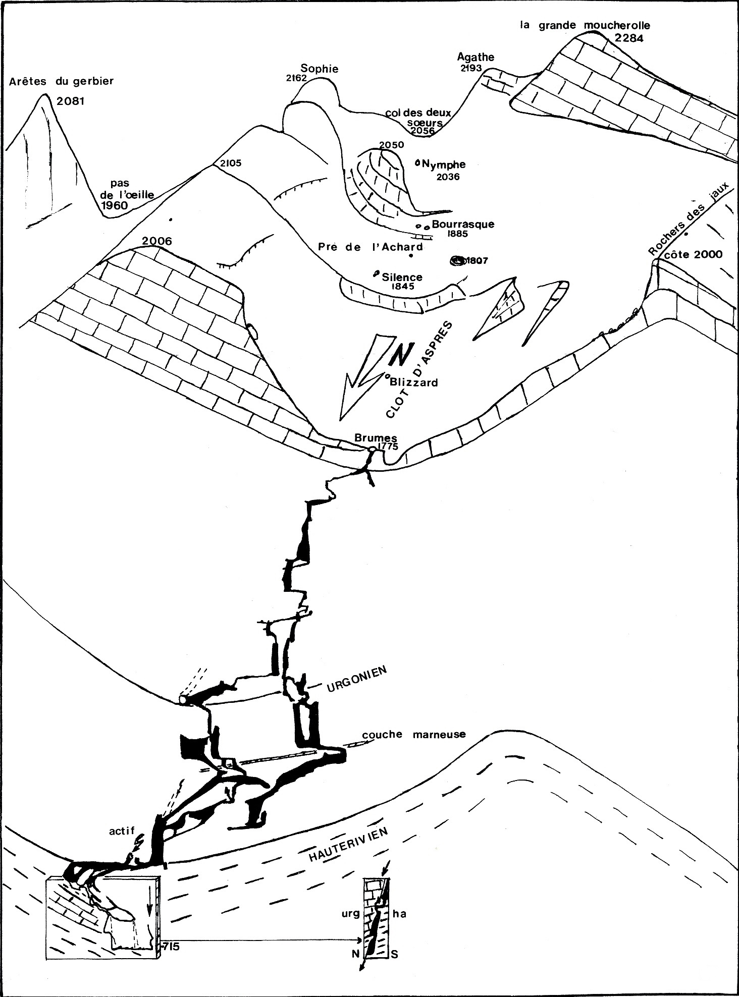 le début du vallon en coupe au niveau du scialet des Brumes Matinales